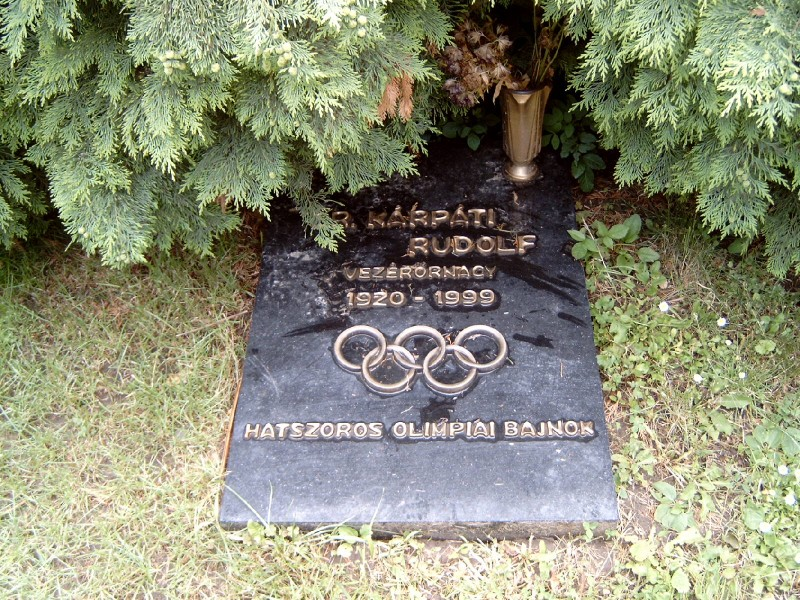 Kárpáti Rudolf sírja Budapesten. Farkasréti temető: 6/2-főút-6.